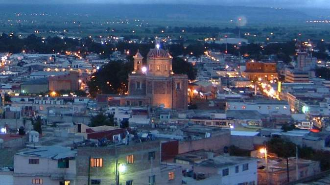 Tulancingo por la tarde desde el Cerro del Tezontle.